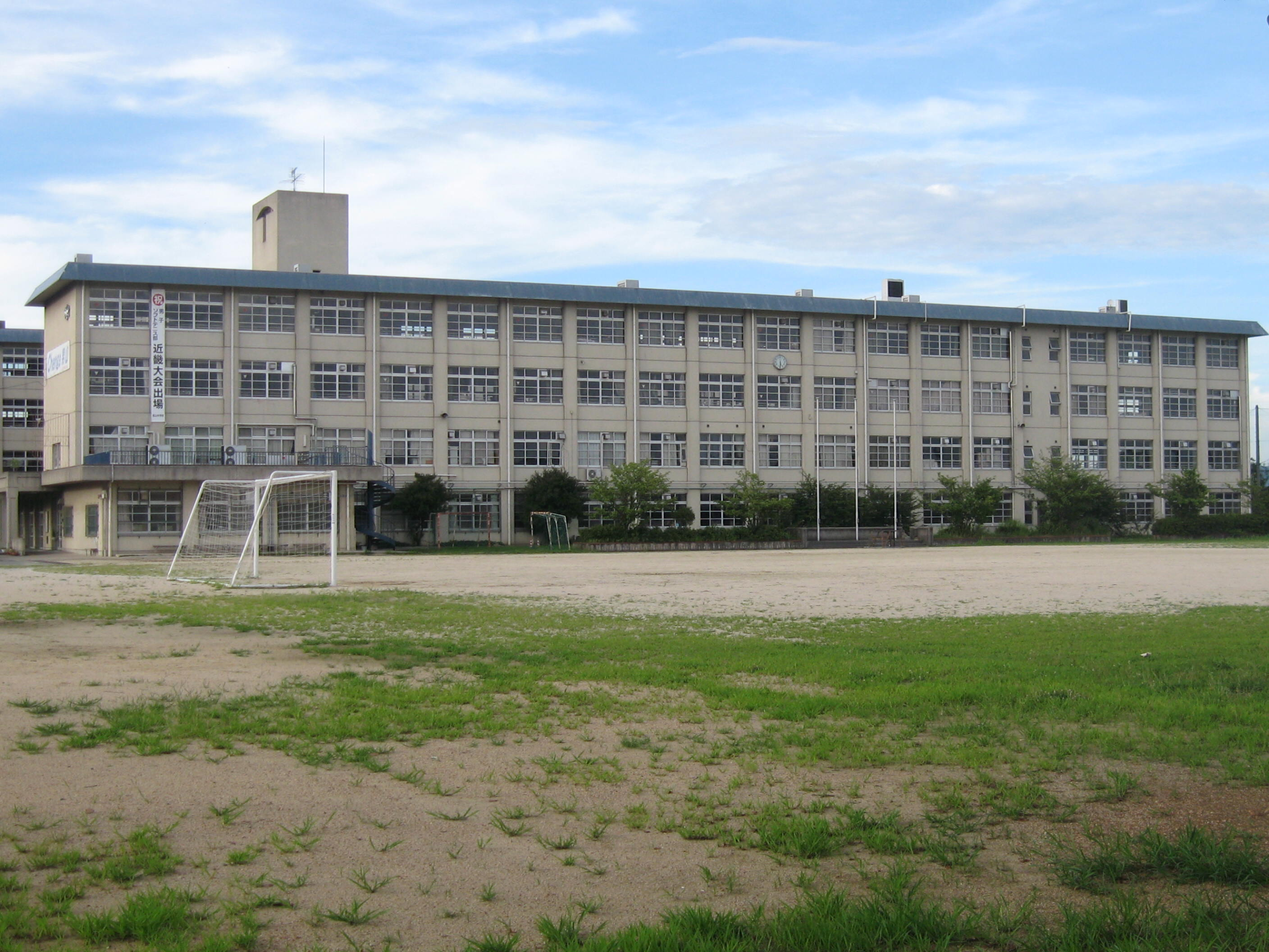 2011年8月6日にcrown userが南側から撮影した八幡市立男山中学校の画像